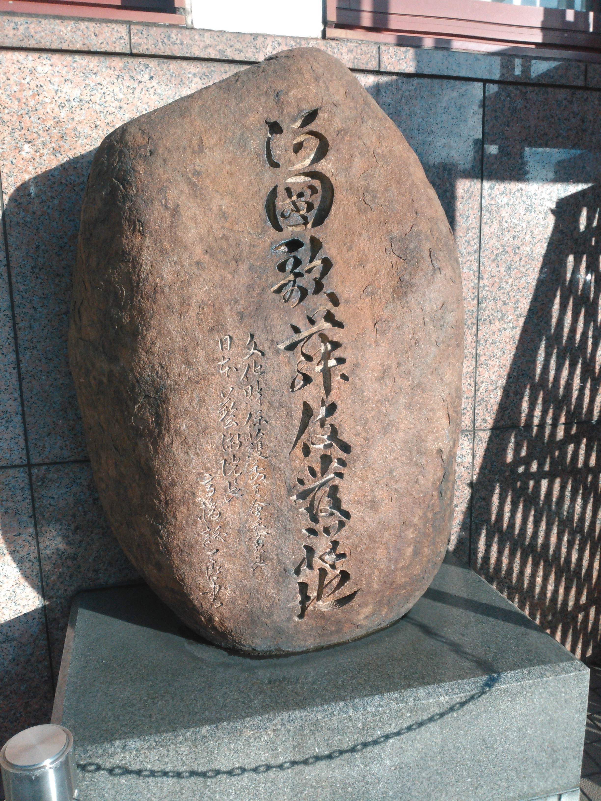 阿国歌舞伎発祥地の碑（京都南座前）